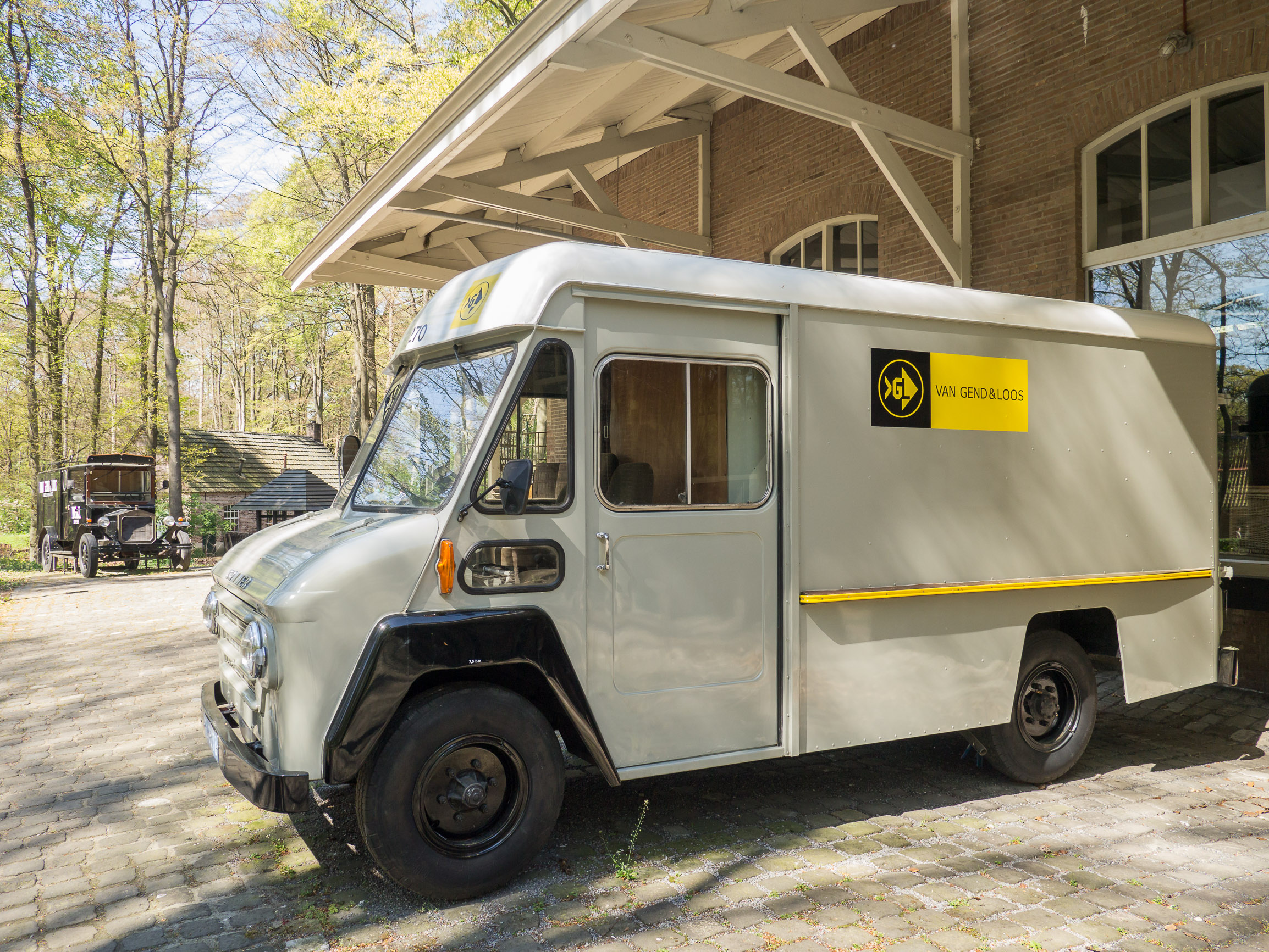 Van Gend en Loos busje - Openluchtmuseum, Arnhem